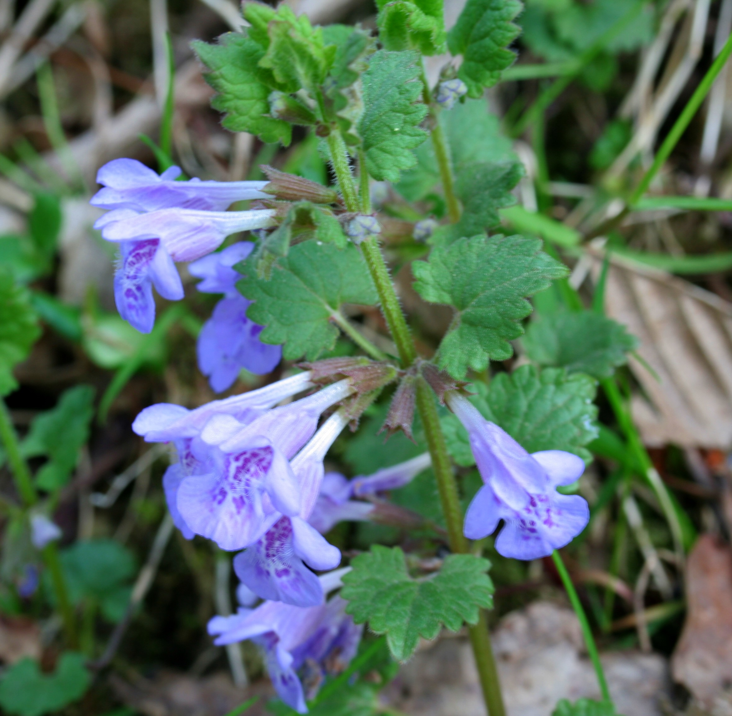 Glechoma_hederacea (Ellera terrestre comune Località: Villiago, Sedico (BL), 387 m s.l.m.